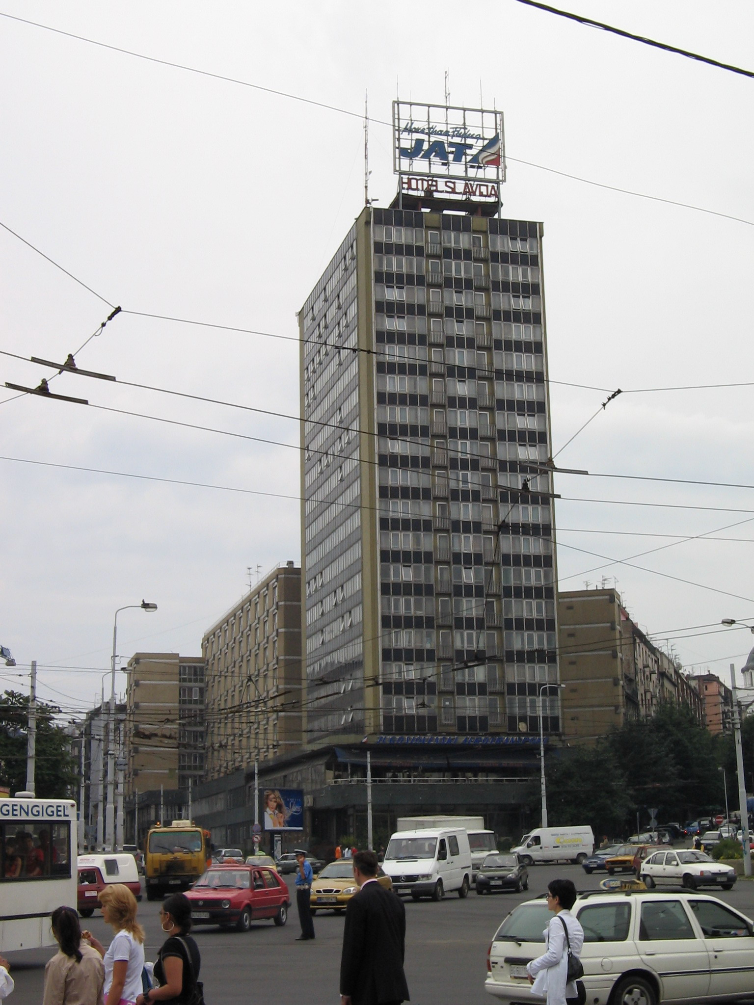 Хотел Славија